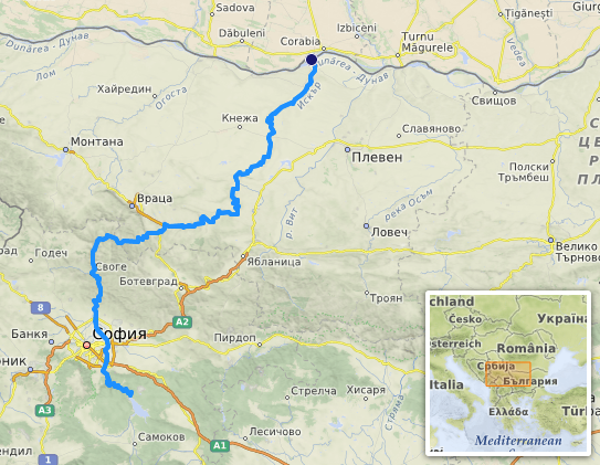 carte réalisée sur umap This map may be incomplete, and may contain errors. Don't rely solely on it for navigation.